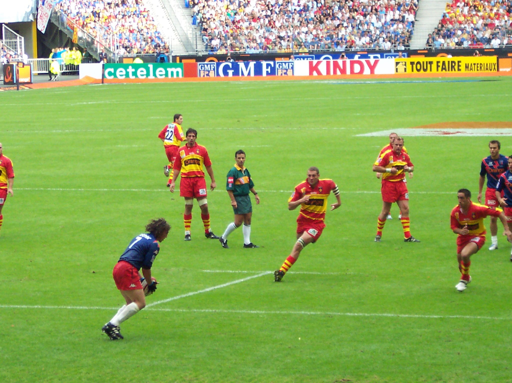 Stade Français / Perpignan en finale du top 14 en 2004 From Flickr. Plaine Saint-denis, St.-Denis